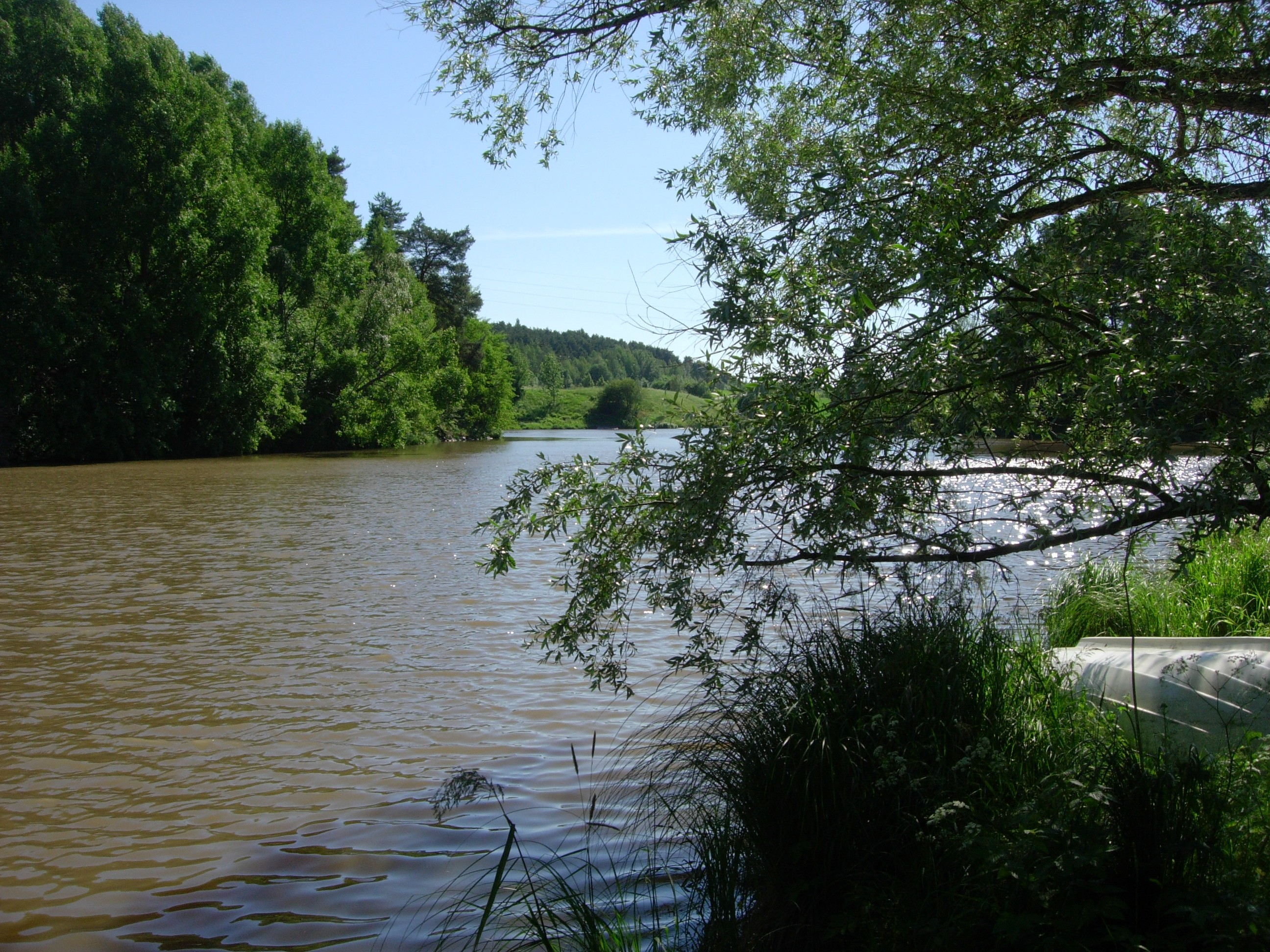 Aurajoen rannalta läheltä Halisten Virnamäkeä. Otettu kanoottiretkellä